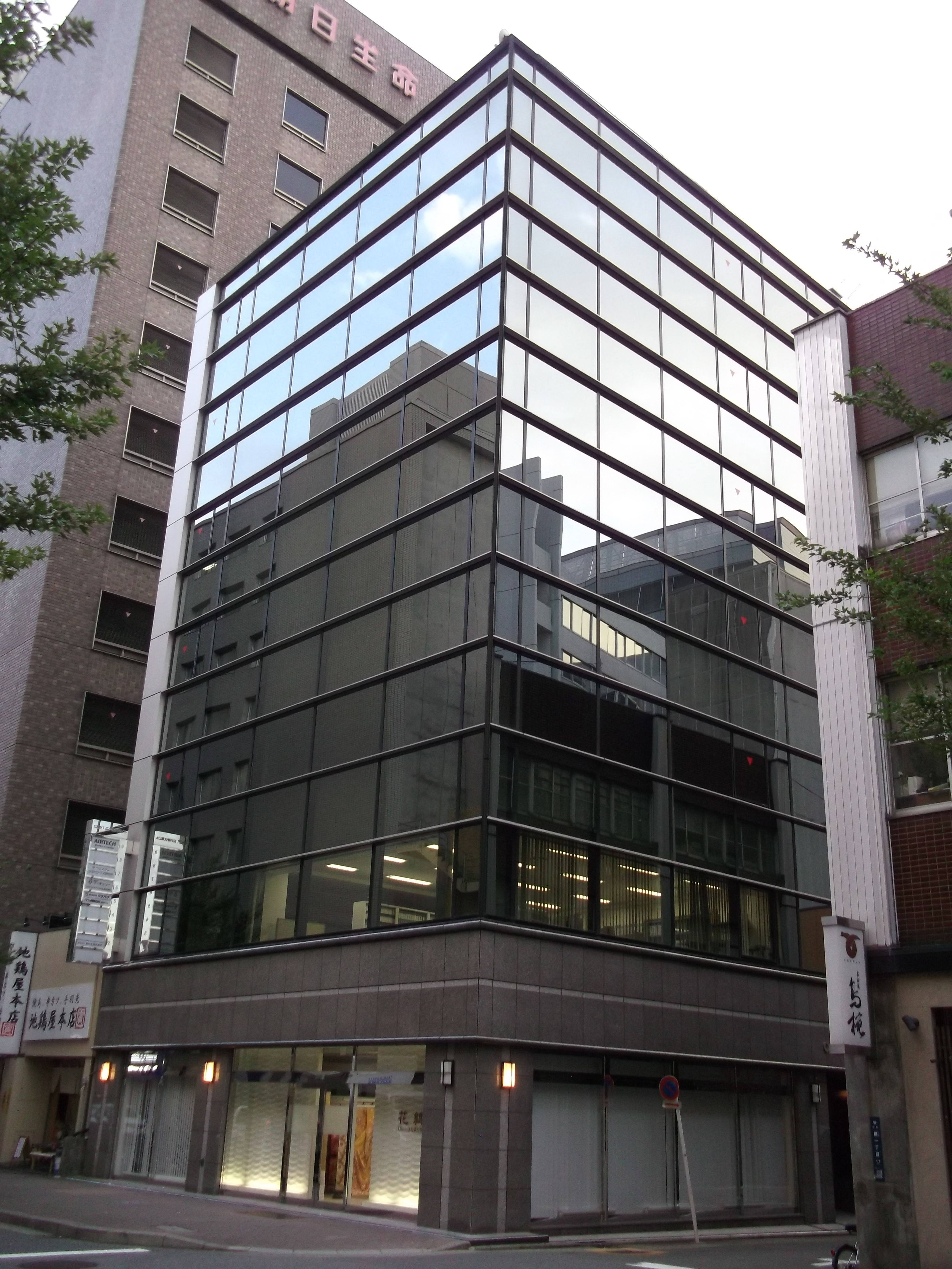 名古屋市中区のCK21広小路伏見ビルを東側公道北側より撮影